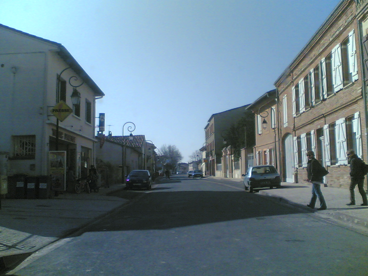 Frouzins (Haute-Garonne, France) : Rue de la République.